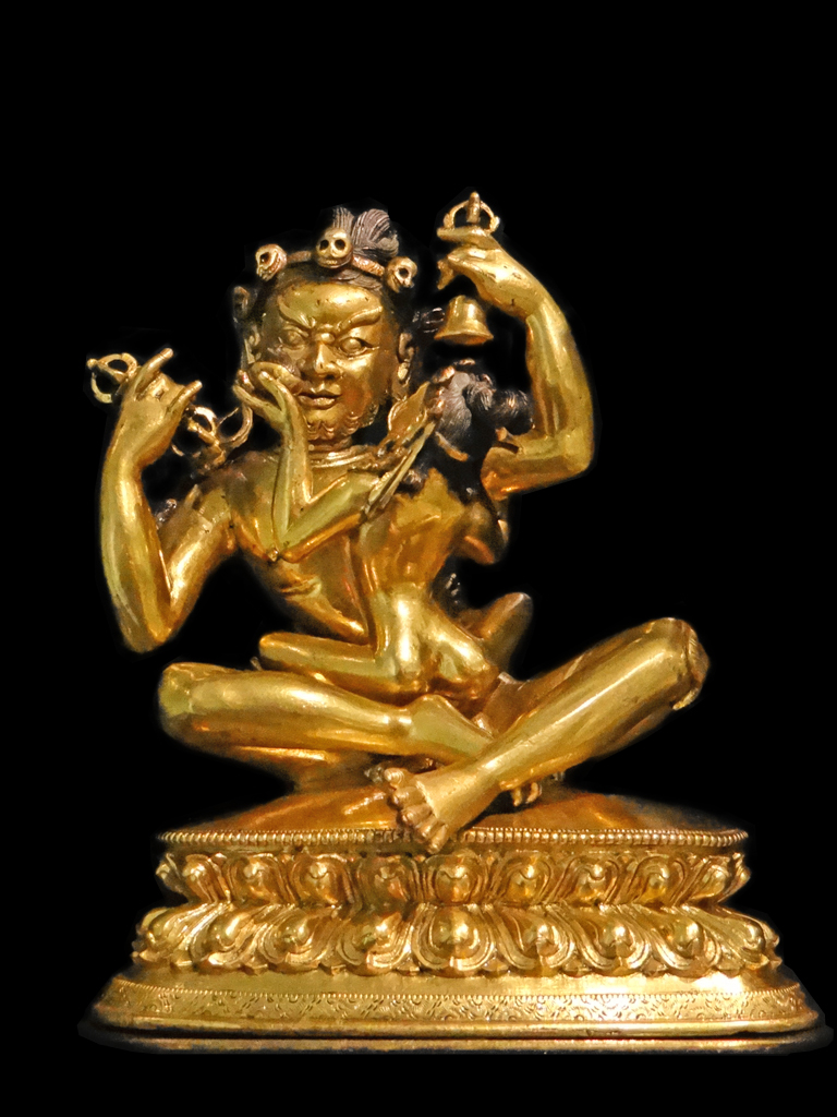 The Mahasiddha Ghantapa 1600-1700 Tibet Gilded Brass (laiton doré) Bouddhisme tantrique / Vajrayana Victoria and Albert Museum, Londres IM 61-1929 Le maître tantrique Ghantapa, en position d'extase mystique, tient dans sa main droite : le Vajra (foudre-diamant) et dans sa main gauche : le Ghanta (clochette). "Le Vajra, associé au Ghanta (Sagesse), symbolise le 'moyen' utilisé pour parvenir à l’Éveil. Leur utilisation conjointe, lors de certains gestes canoniques (mudra), représente l'union de ces deux principes complémentaires." (G. Beguin). Site du Victoria and Albert Museum (Londres) Article de Wikipedia sur les Mahasiddha